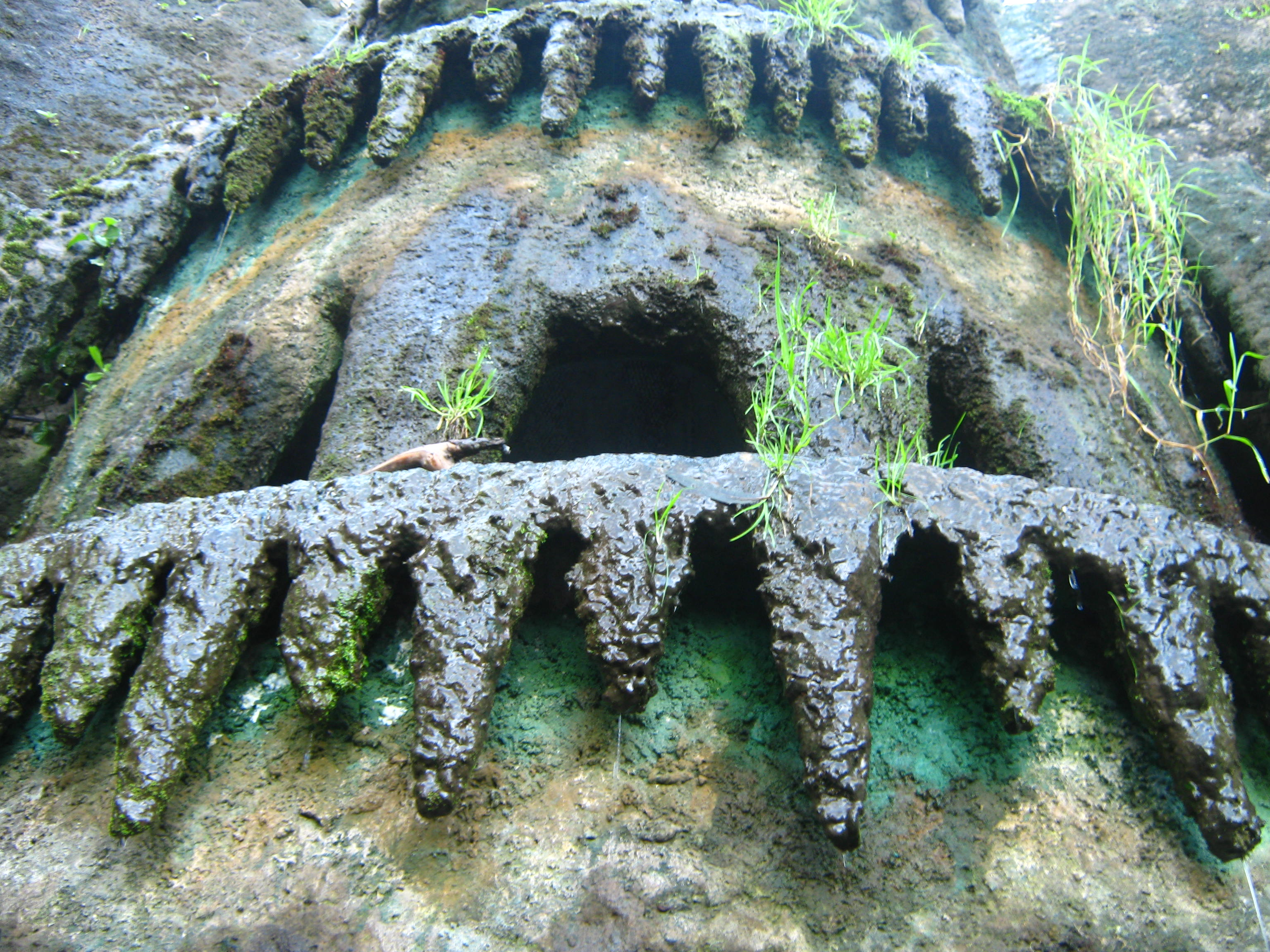 Toro. Ubicada en el departamento de Maldonado